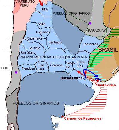 Provincias Unidas, abril de 1812 (sublevación Carmen de Patagones)